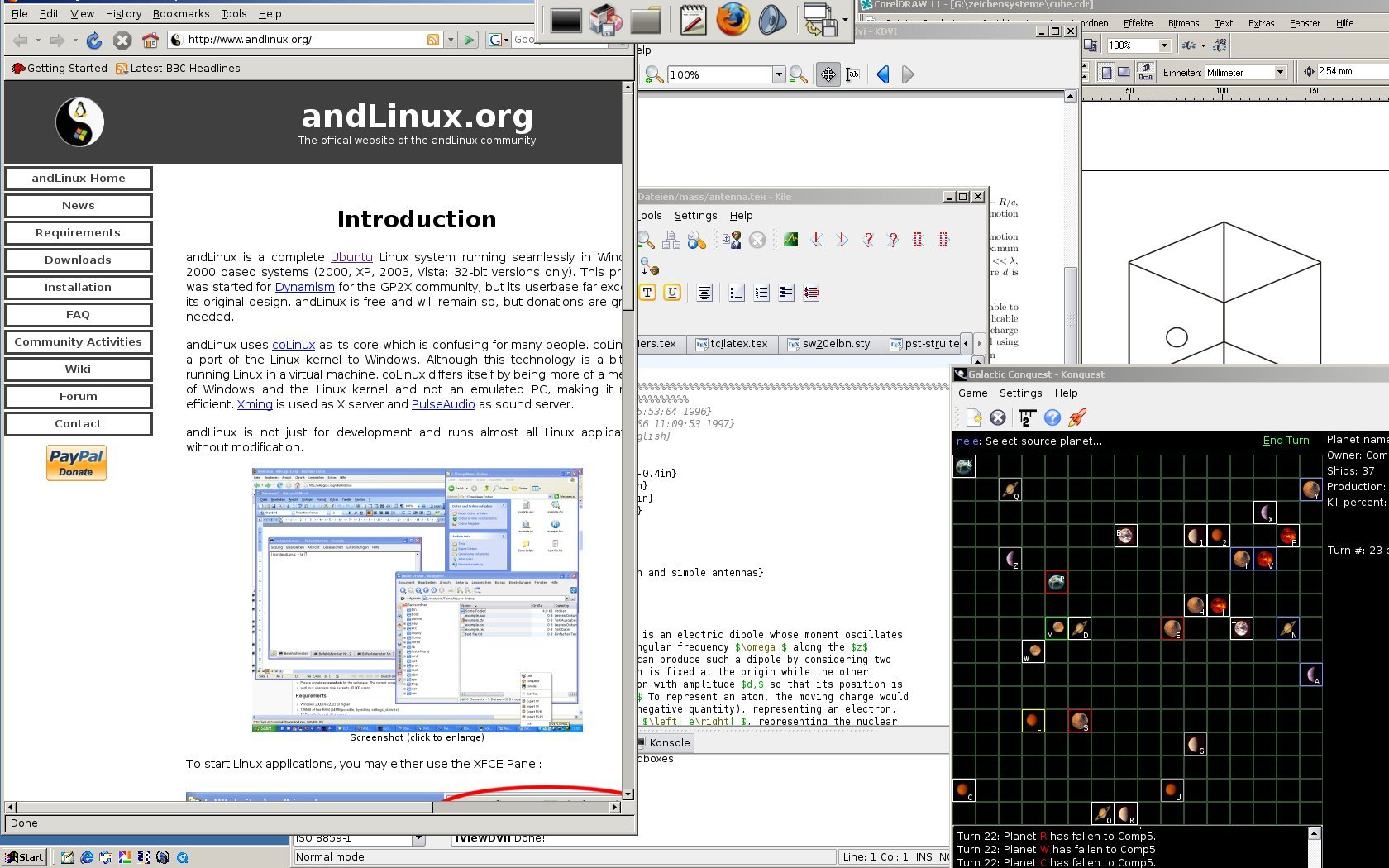 Cooperative Linux / Ubuntu